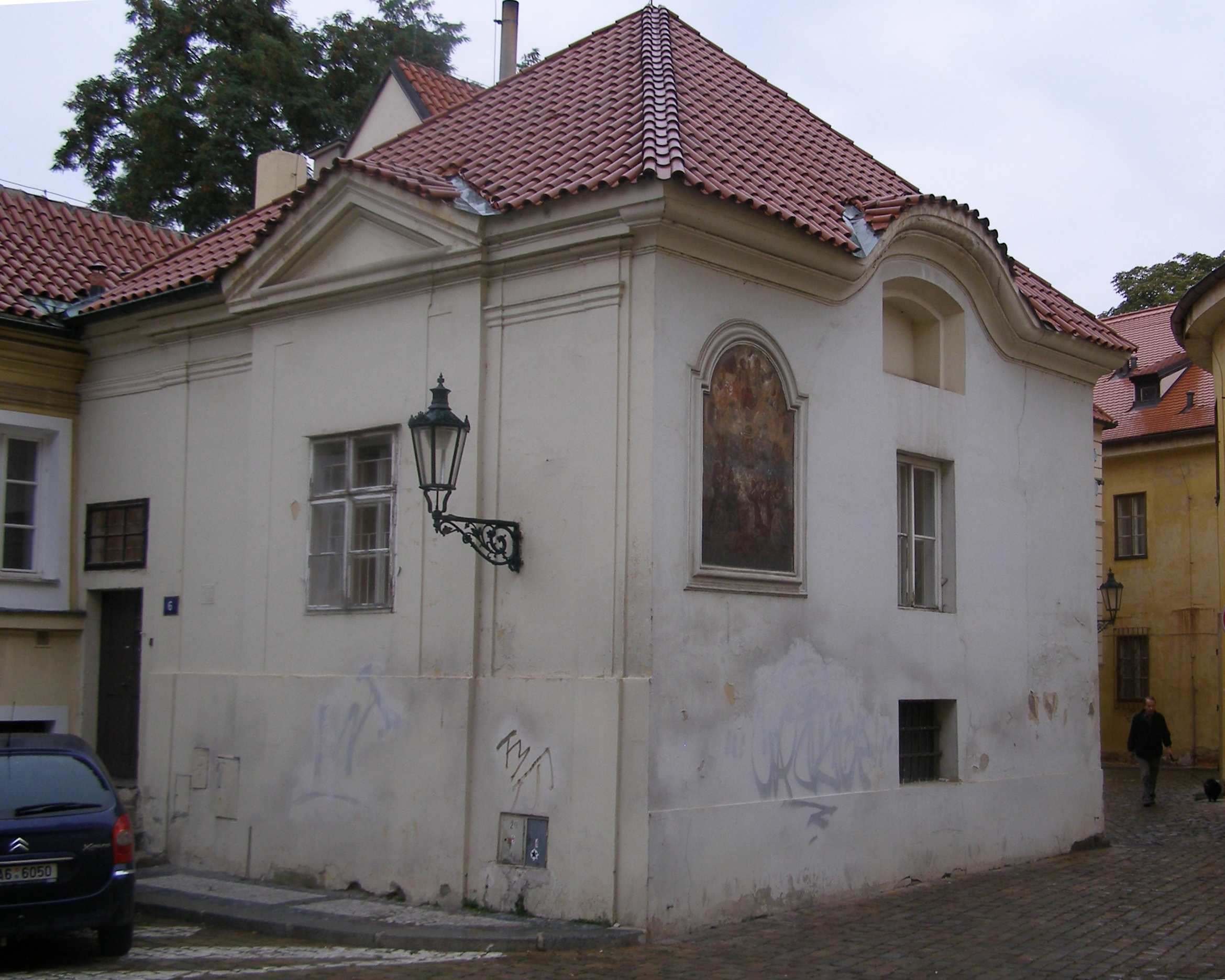 Kostnice a kaple Nejsvětější Trojice (Staré Město), Praha 1, Haštalské nám. 1041/6, Staré Město